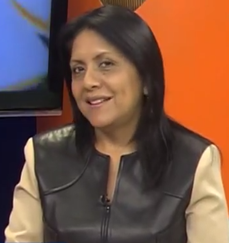 Ministra Gisela López en mayo de 2018